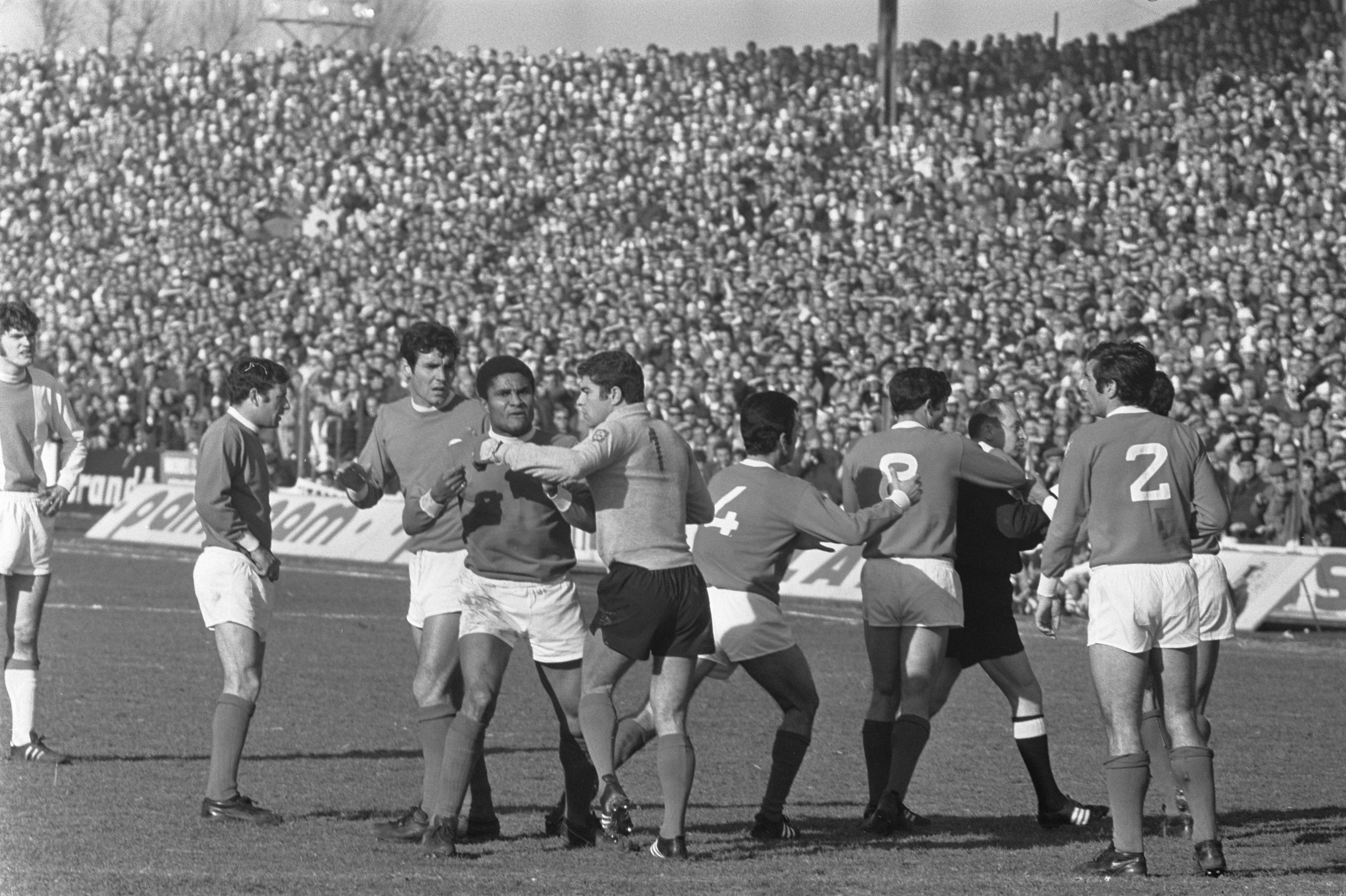 Ajax tegen Benfica 3-0, beslissingswedstrijd kwartfinale Europacup I in Parijs nerveuze Benfica-spelers belagen de scheidsrechter, Eusebio en keeper Henrique. 5 maart 1969